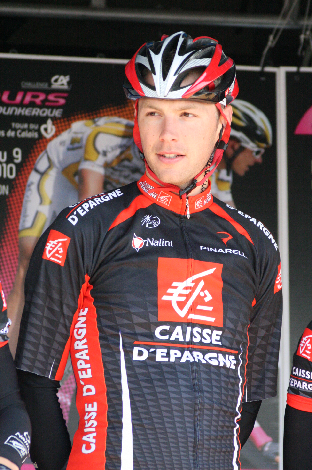 Arnaud Coyot, lors de la présentation des équipes des 4 jours de Dunkerque 2010